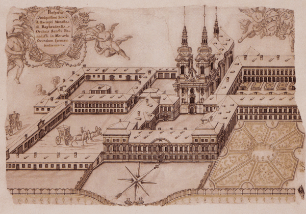 Rajhrad, benediktýnský klášter, 70 léta 18. století